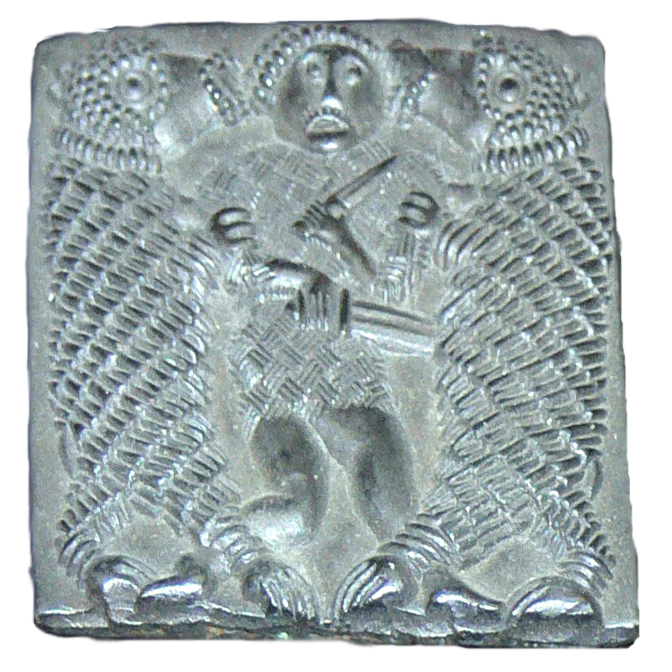 Model aus Björnhovda im Kirchspiel Torslunda auf Öland (Schweden). 2. Hälfte des 6. Jh. Replik im Römisch-Germanischen Museum in Mainz. (Original im Staatlichen Historischen Museum Stockholm).